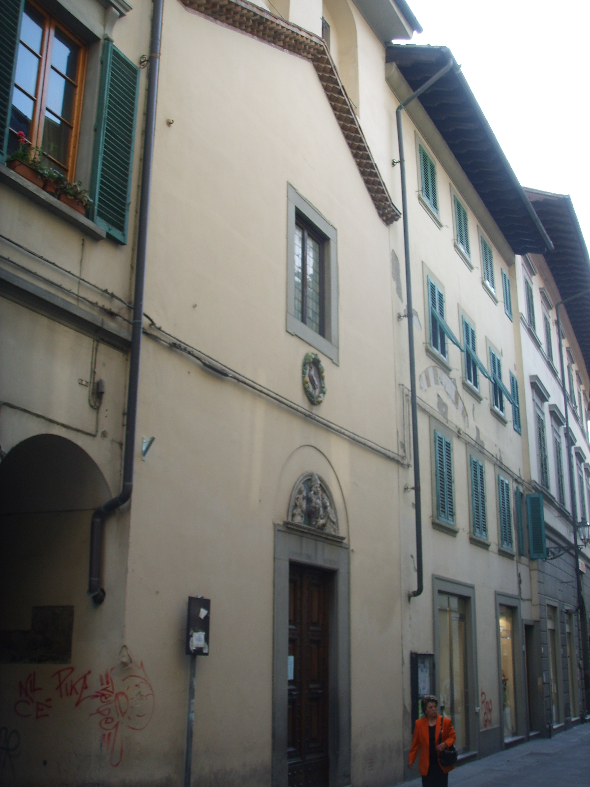 Oratorio della madonna del buonconsiglio